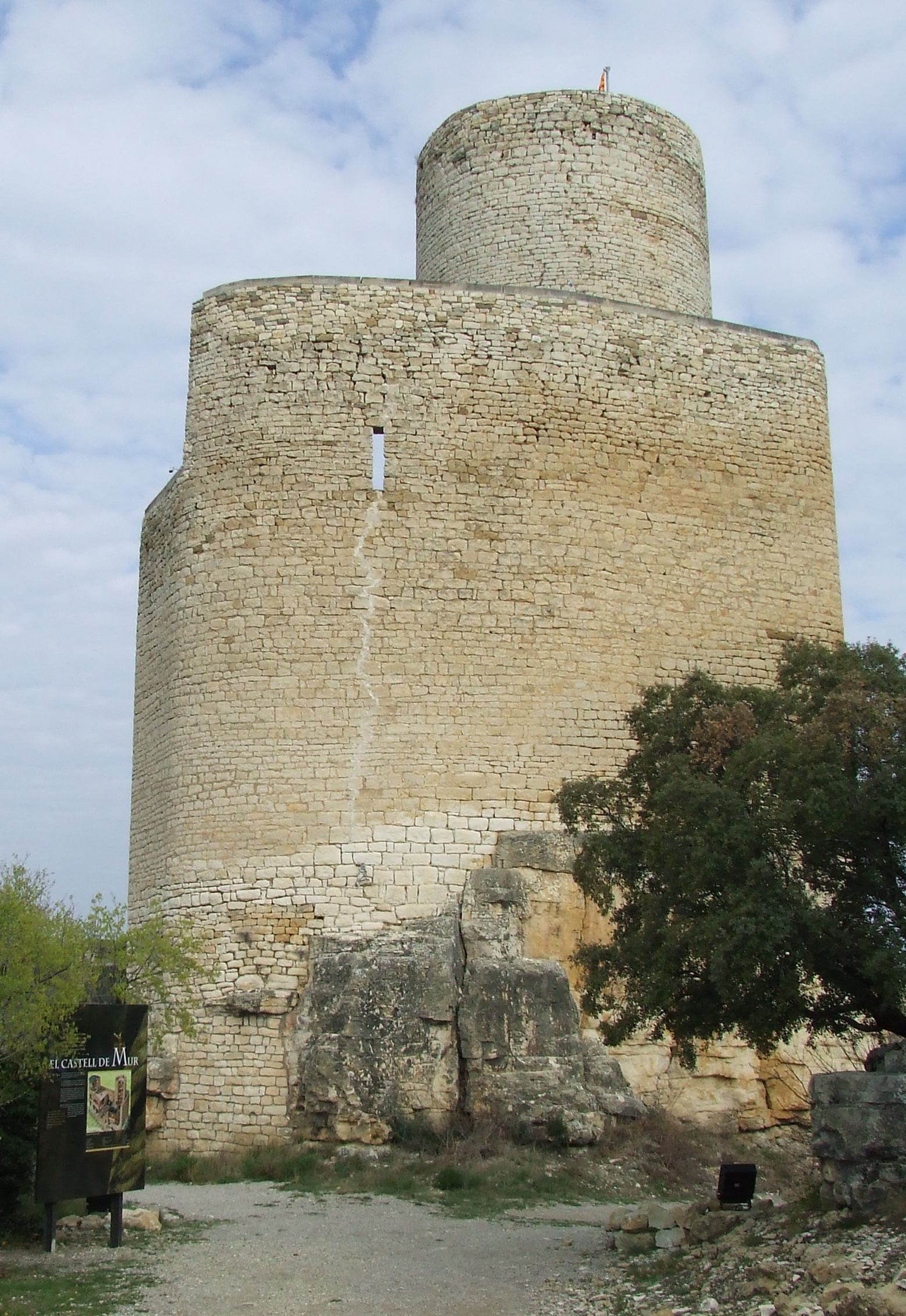 Façana de llevant del castell (Castell de Mur, Pallars Jusasà)